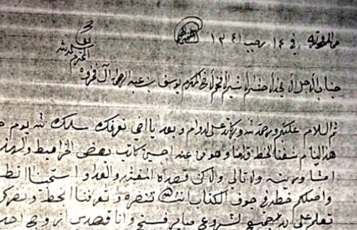 رسالة من عثمان عبدالرحمن قاسم حسن محمود آل فخرو في قطر إلى الوجيه يوسف عبدالرحمن عبدالله حسن محمود آل فخرو في البحرين كتبت في الأول من ابريل 1923 م، بدايتها: جناب الأجل الأمجد صاحب الشيم الأفخم الأخ المكرم يوسف بن عبدالرحمن آل فخروه المحترم/و هي من ممتلكات و وثائق السيد عبدالواحد آل فخرو.